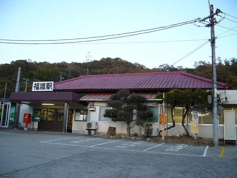 津山線福渡駅 駅舎（撮影当時は御津郡ja:建部町）